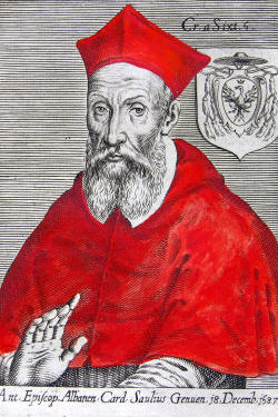 Cardinale Antonio Maria Sauli